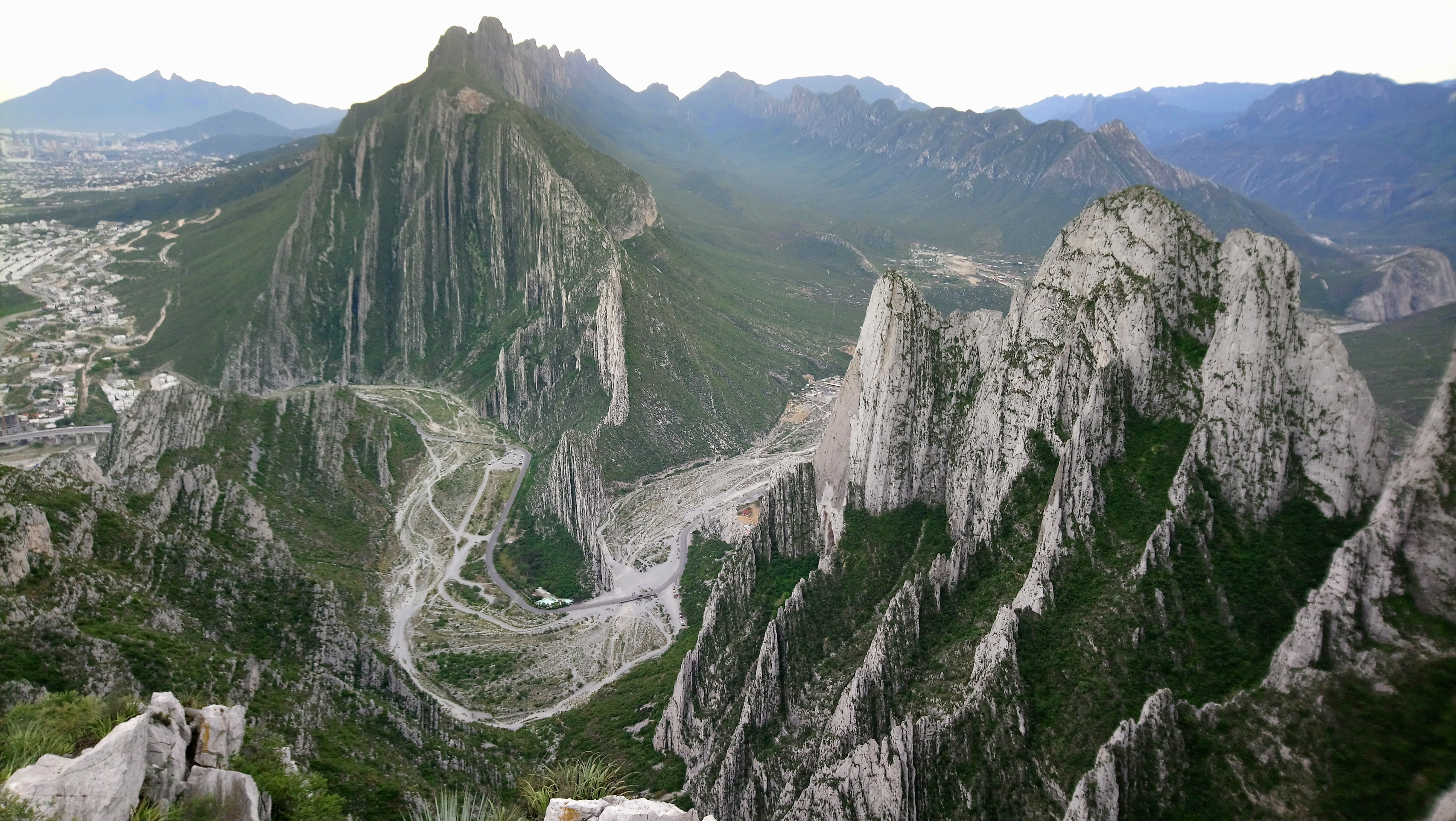 Río Santa Catarina en el Cañón de Huasteca